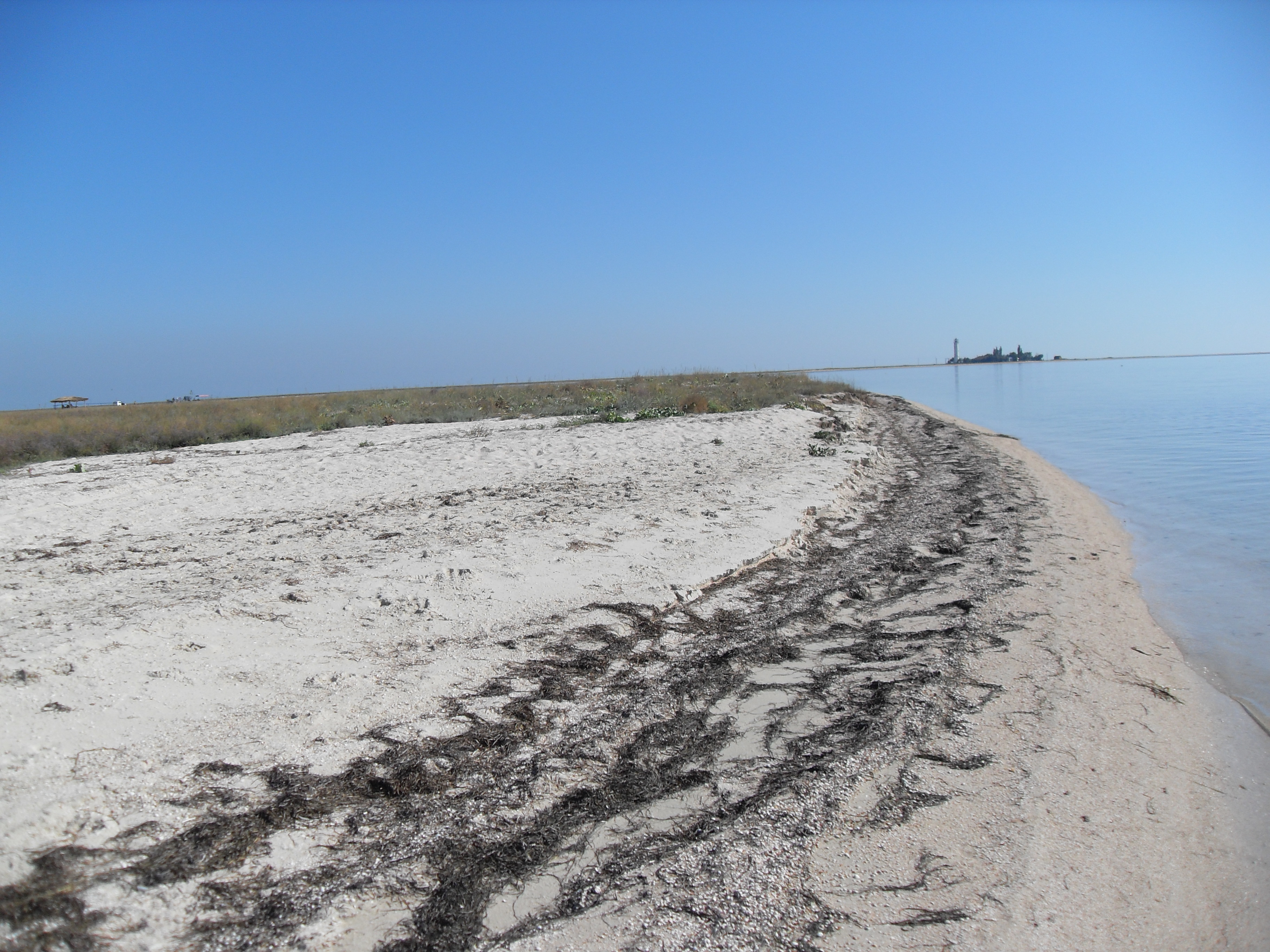 Курган, Генічеський район, Бирючий острів